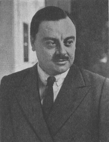 Luis Agustín León, político argentino de la Unión Cívica Radical, oriundo de la provincia del Chaco.